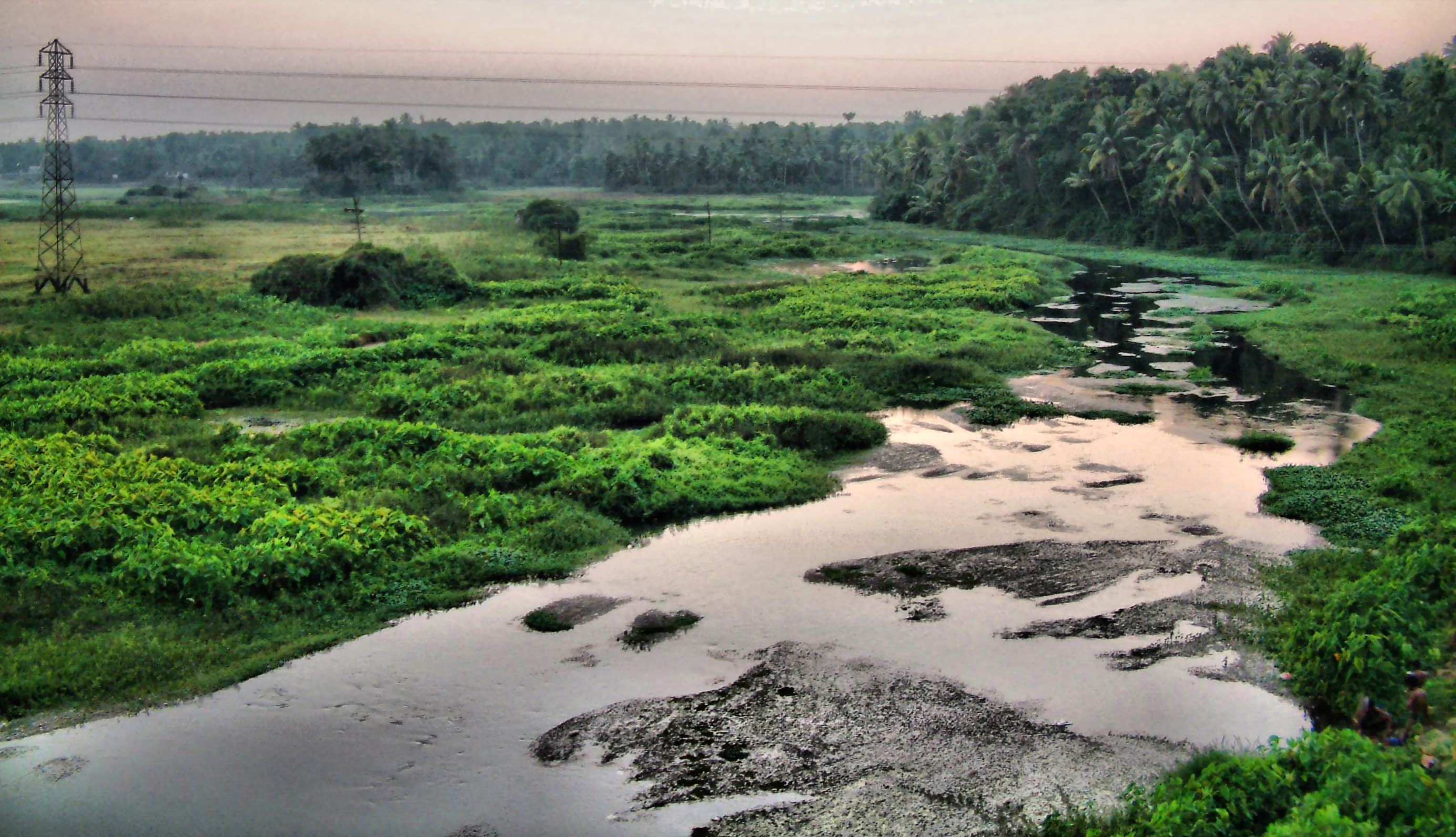 അങ്കമാലി - മാഞ്ഞലി തോട് (പുഴ)